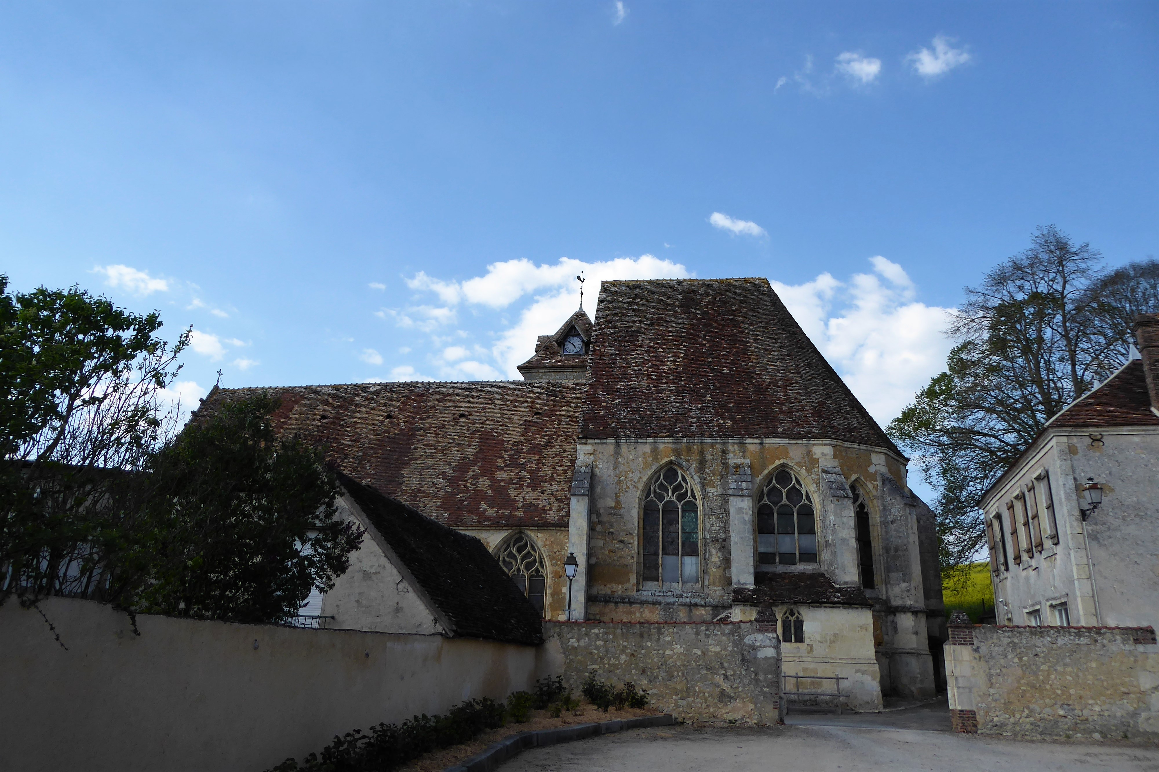 Façade sud de l'église Saint-Georges de Souancé-au-Perche, Eure-et-Loir, France.